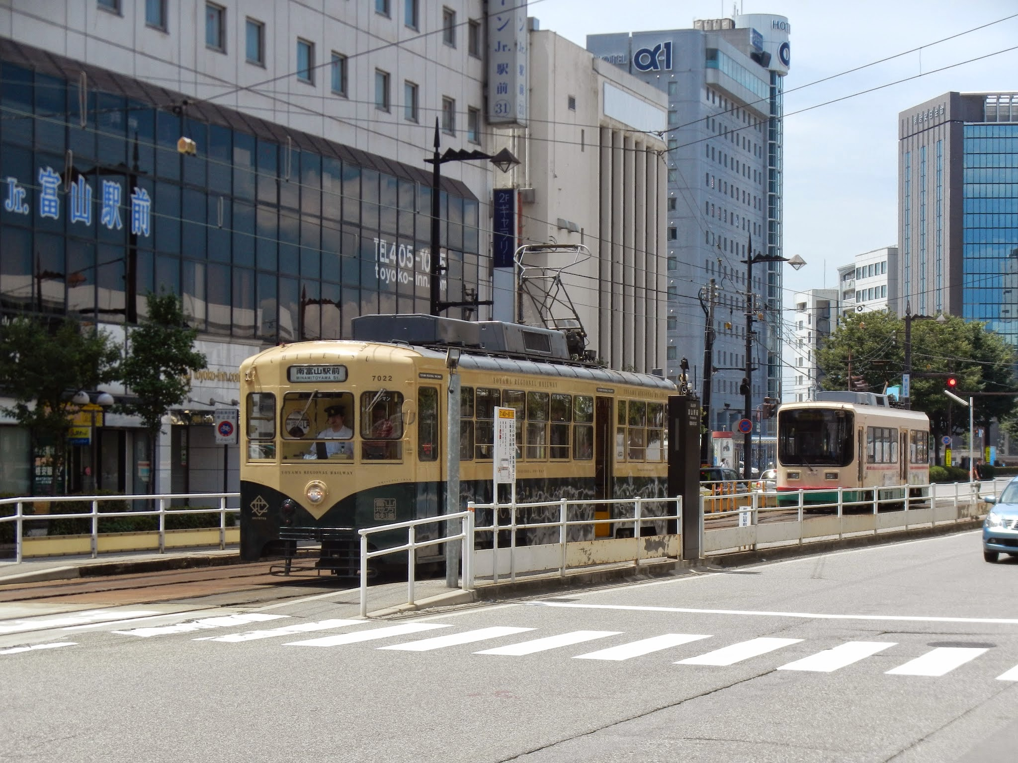 1 Chome Sakuramachi, Toyama-shi, Toyama-ken 930-0003, Japan